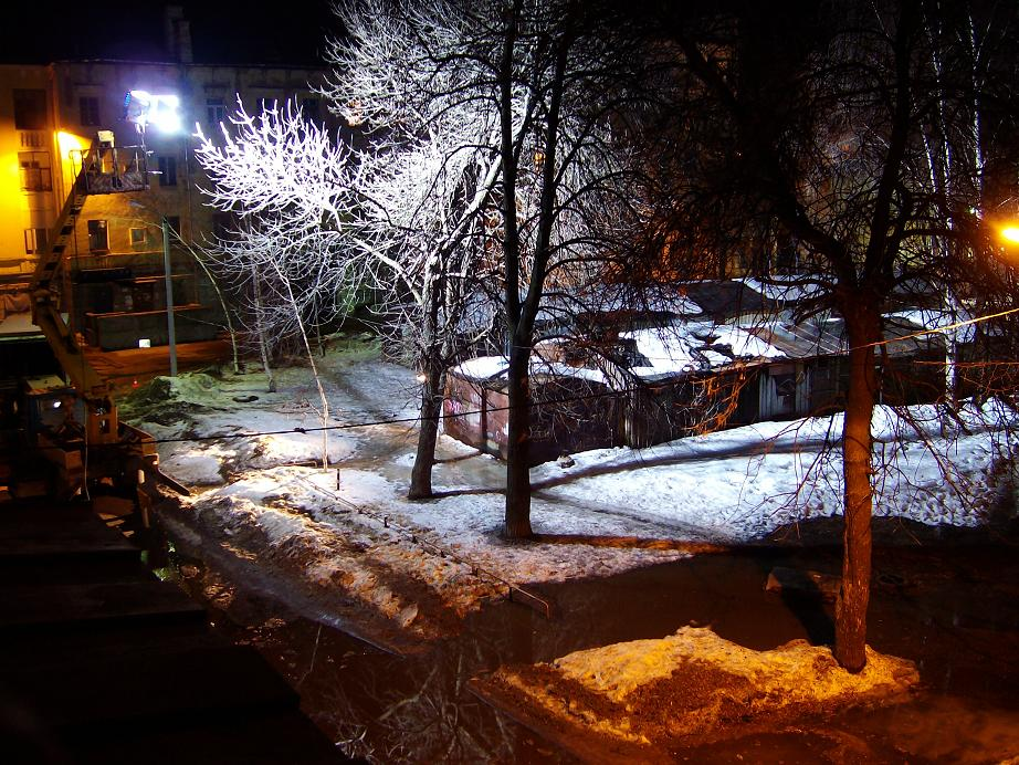 Ярославский двор, в котором были сняты многие эпизоды кинофильма З. Ройзмана "У каждого своя война" (2010), с выставленным для съемок светом.